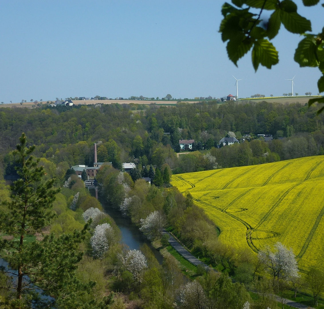 Blick vom linken Zschopauufer auf Meinsberg